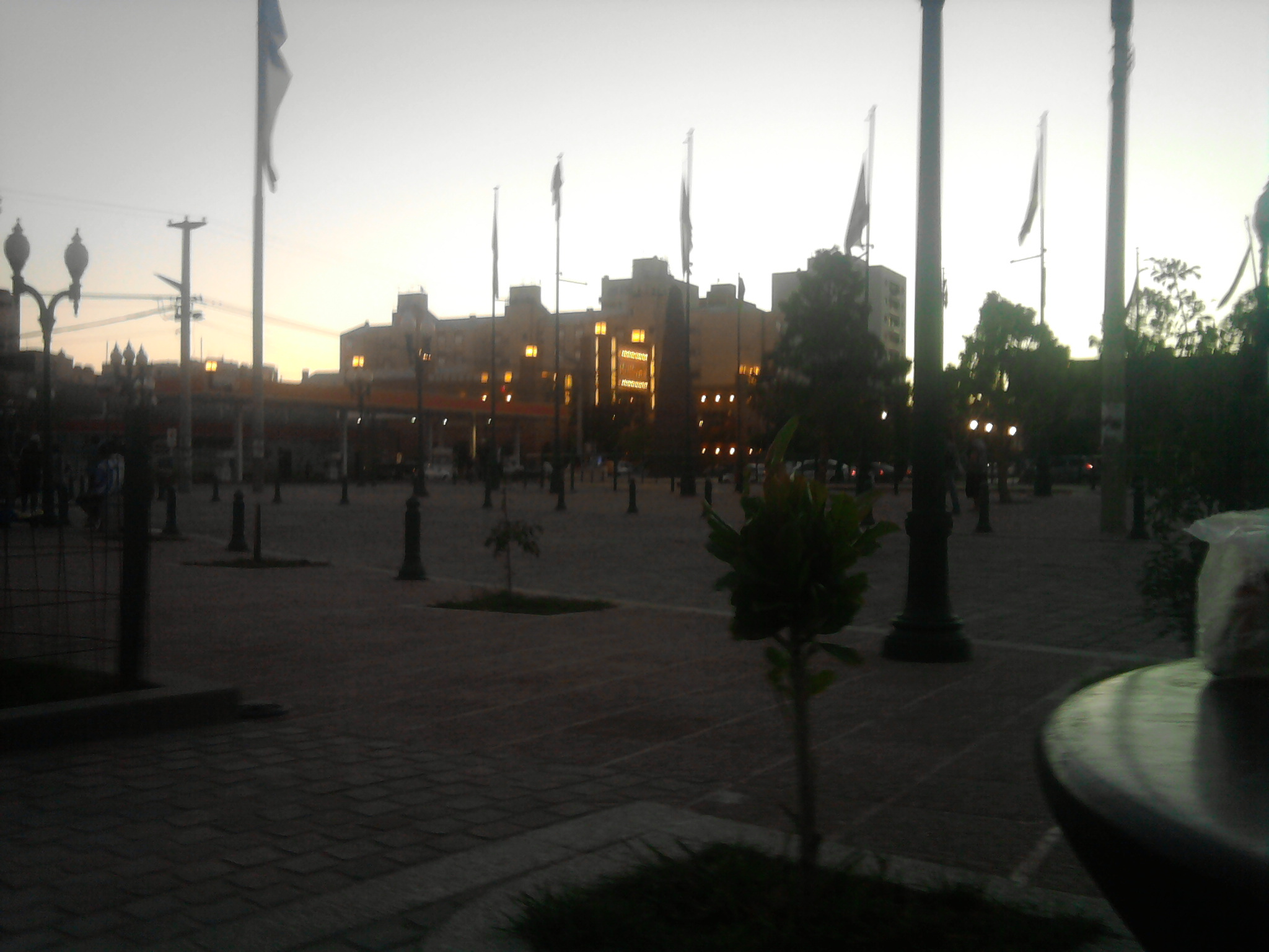 Fonto al lado de la peatonal toma atardecer